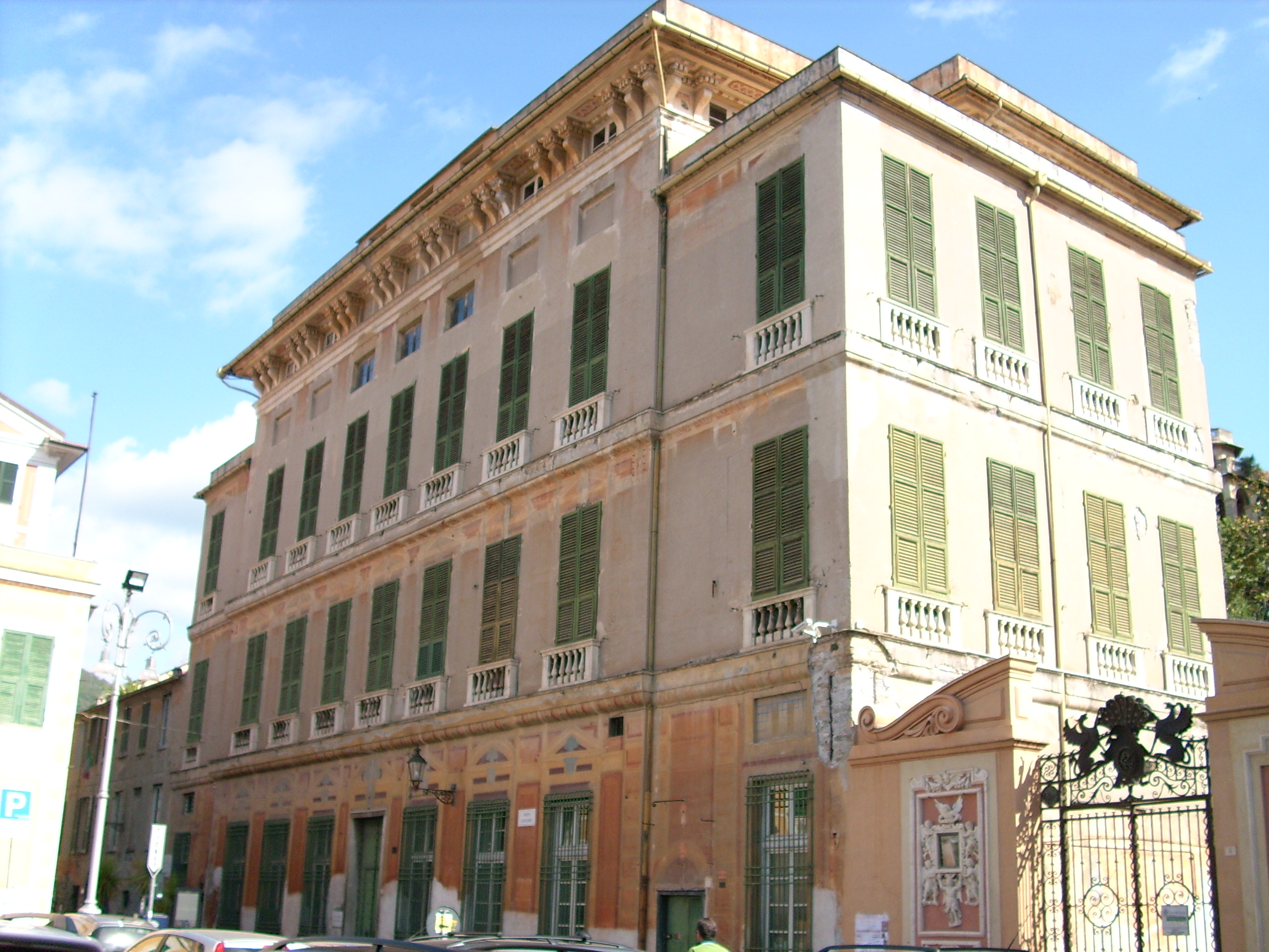 Palazzo Rocca a Chiavari, Liguria, Italia